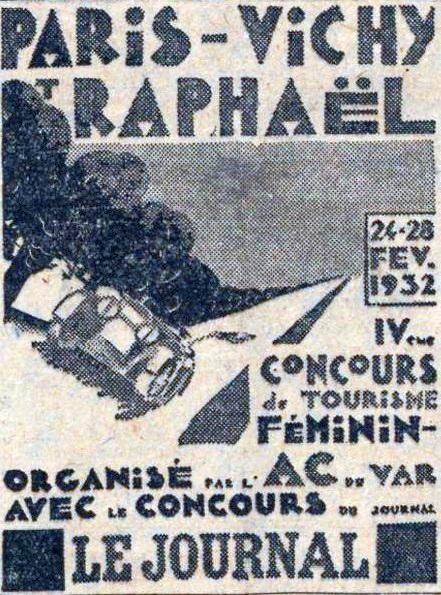 Rallye féminin Paris-Vichy-St Raphael de 1932